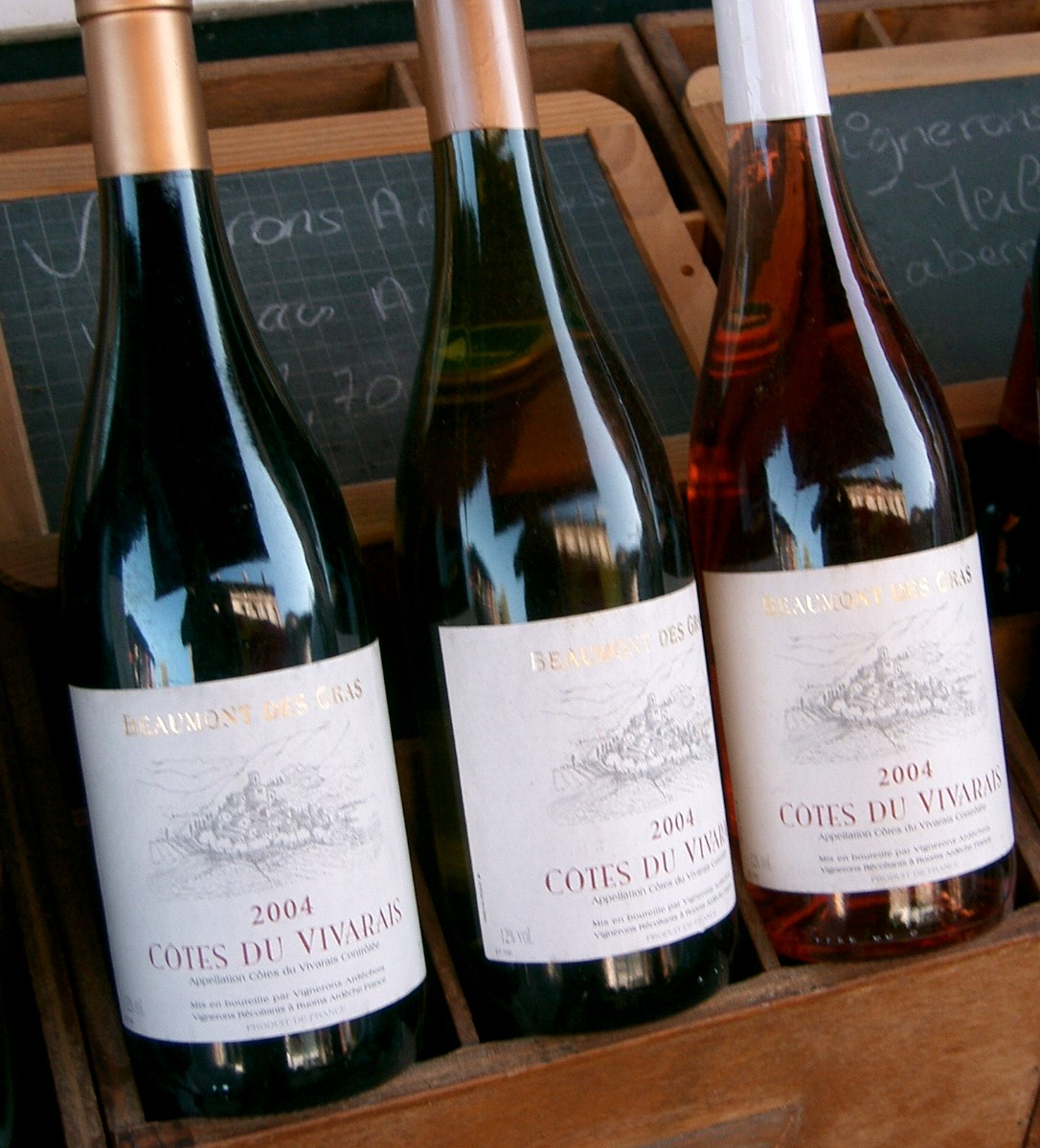 bouteilles de vin d'Ardèche (France) : AOC Côtes du Vivarais